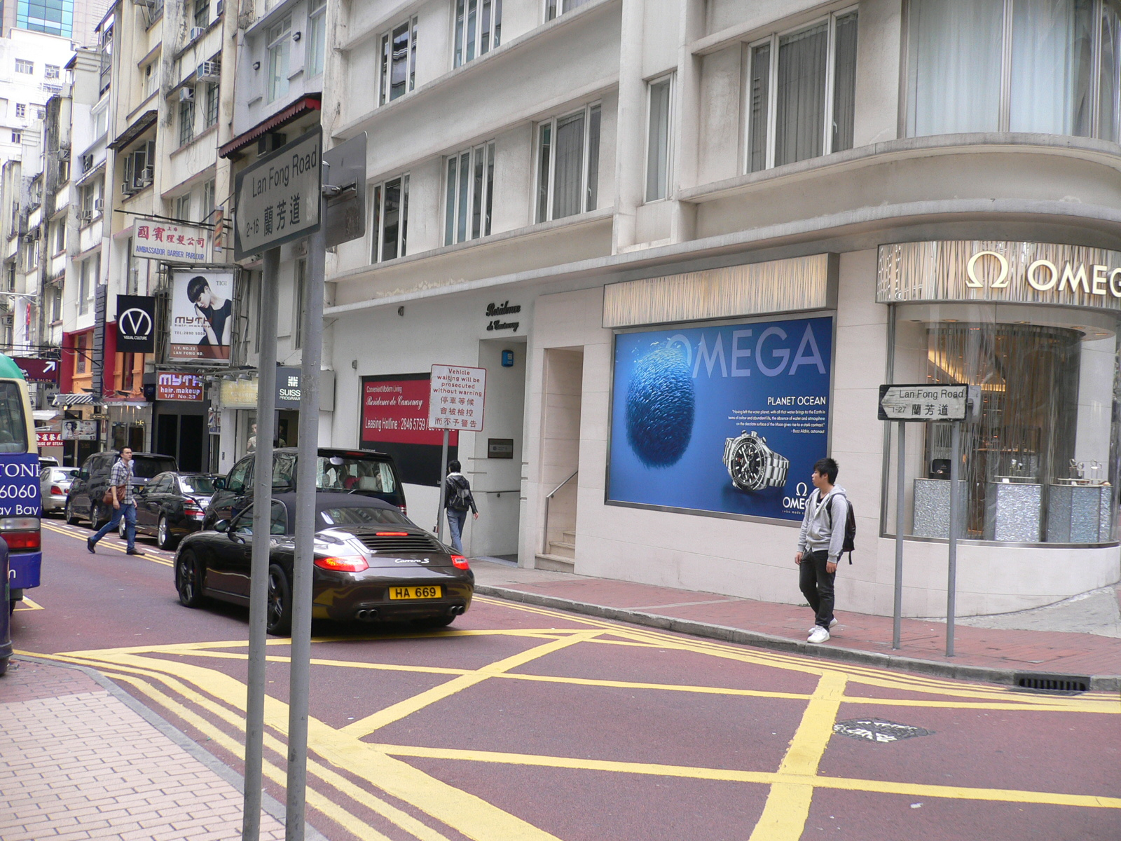 蘭芳道